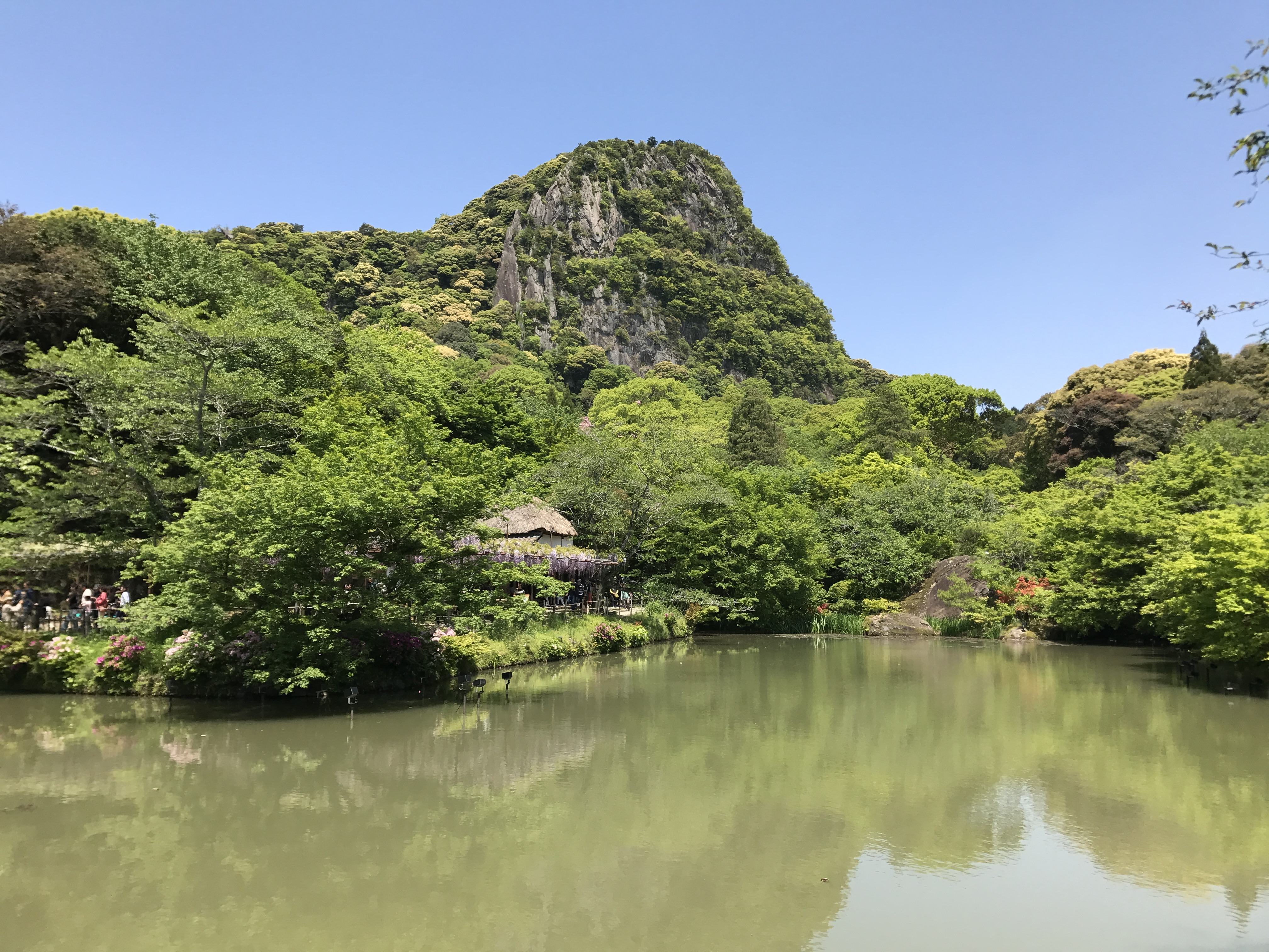 御船山楽園の池と御船山